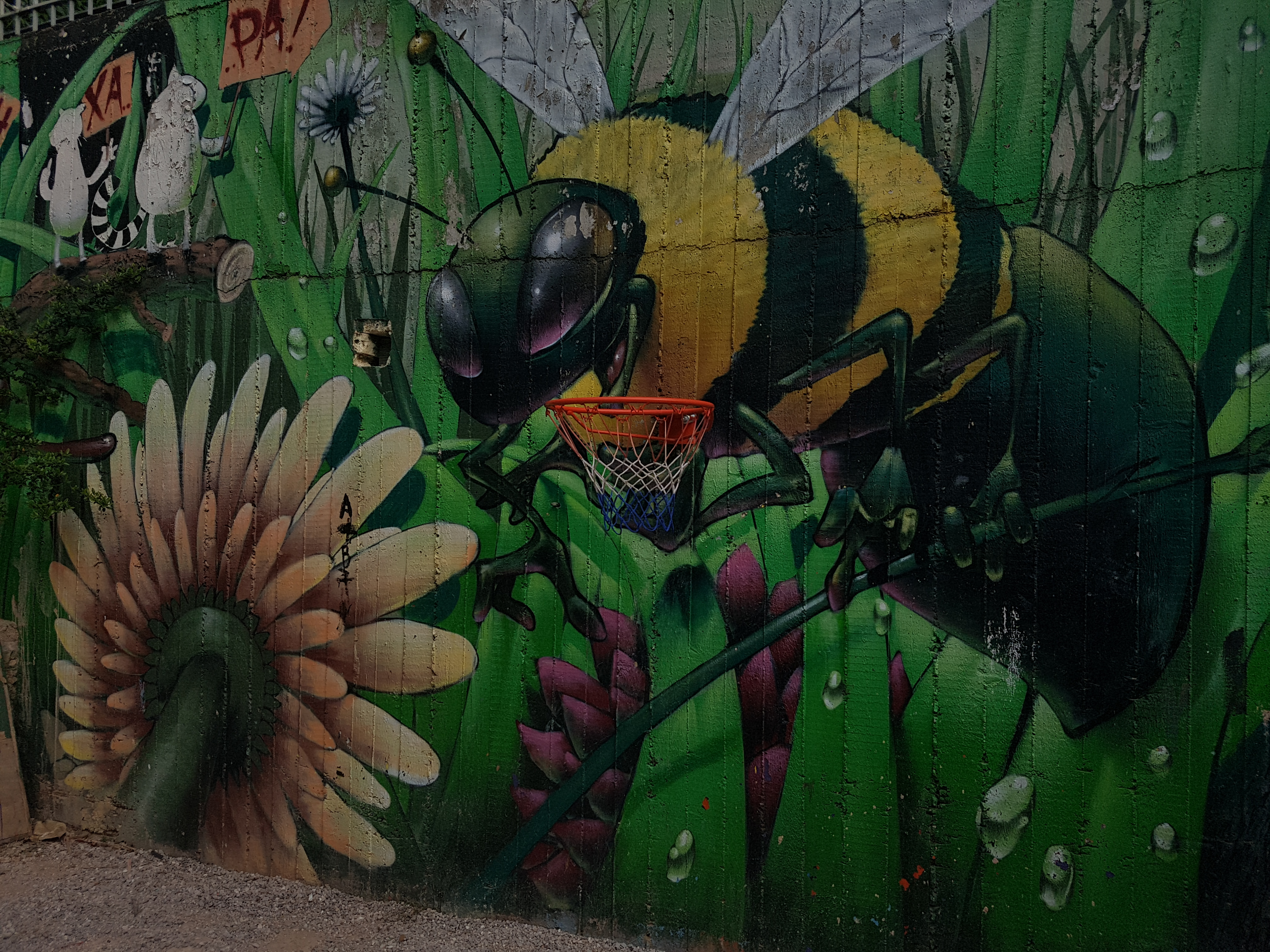 2nd graffiti at Park Navarinou.